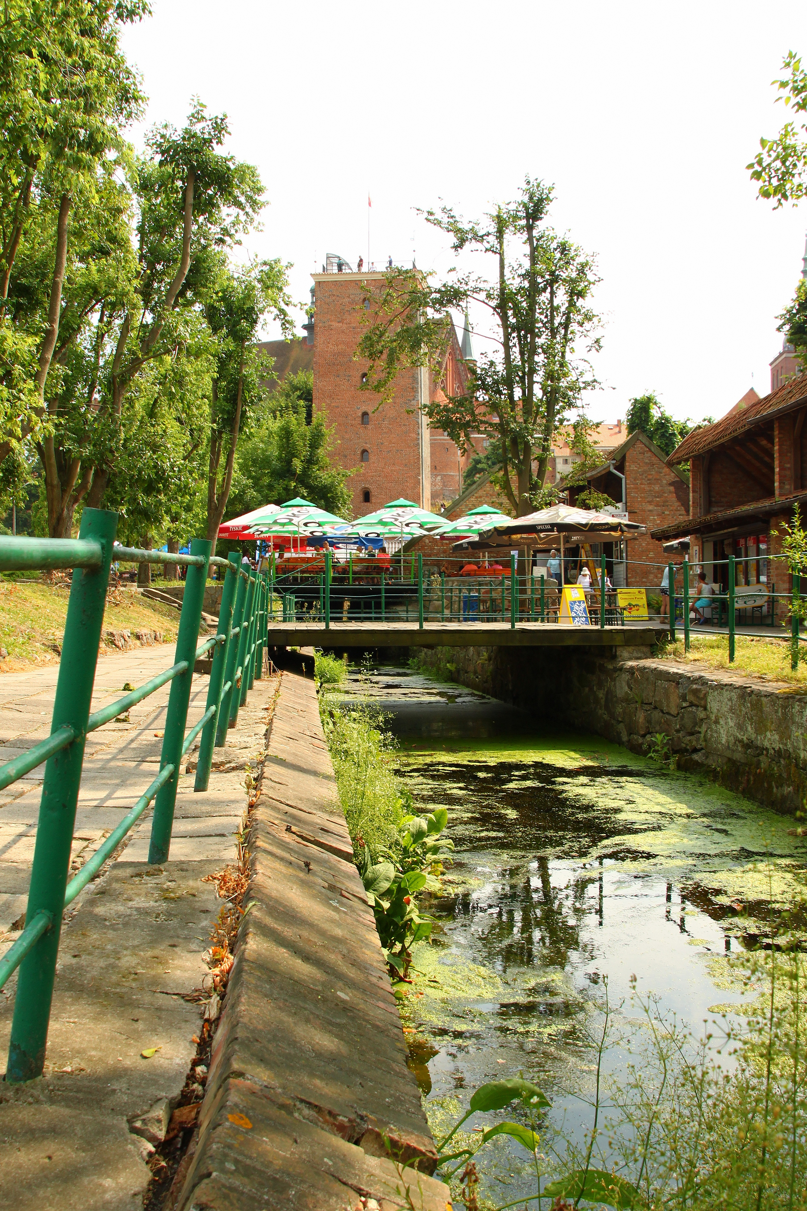 Frombork, kanał wodny (tzw. Kanał Kopernika), XV